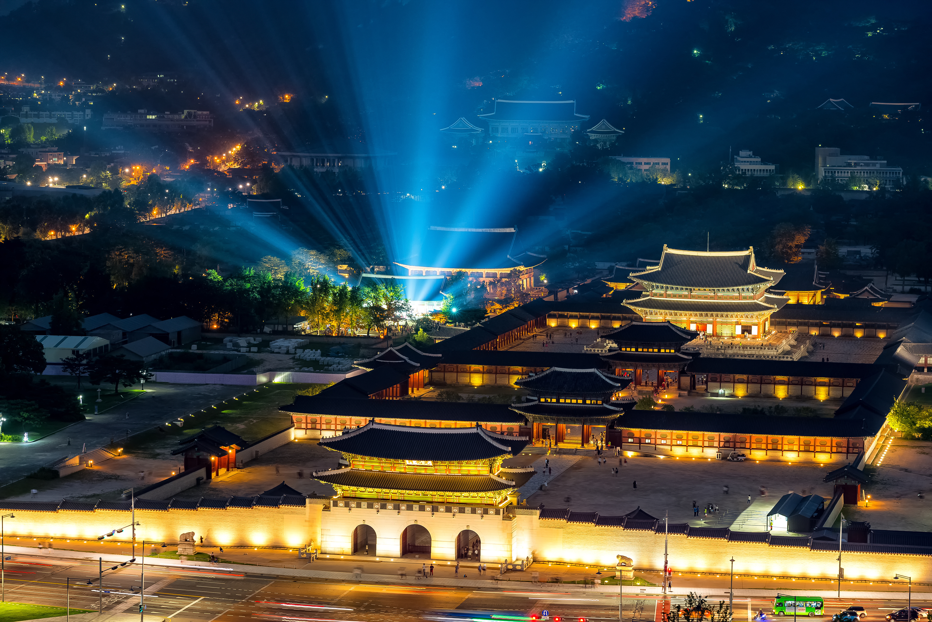 조선말: 2016 경복궁 야간특별관람 아름다운 역사속으로 떠나는 여행